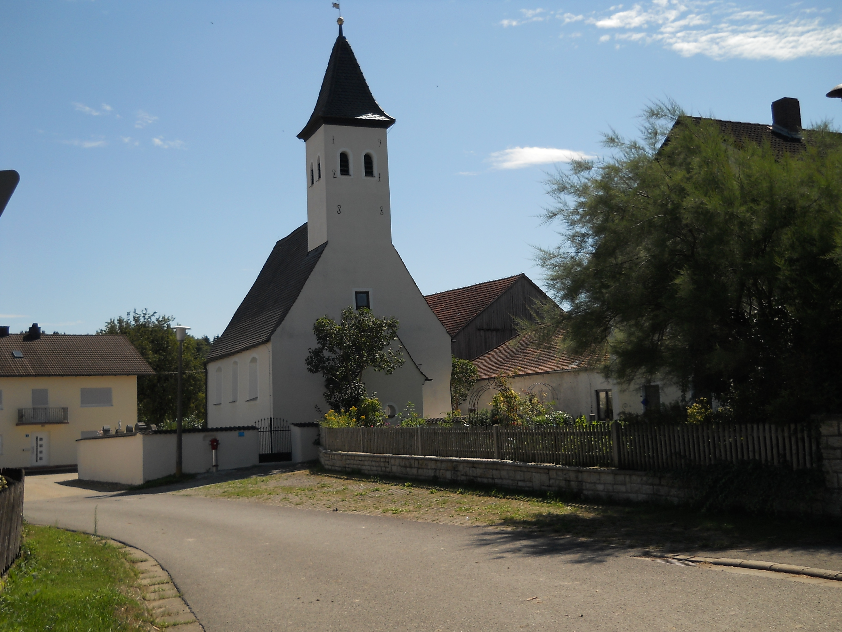 Filialkirche in Krut, Ortsteil der Gemeinde Kipfenberg im Landkreis Eichstätt (Oberbayern)